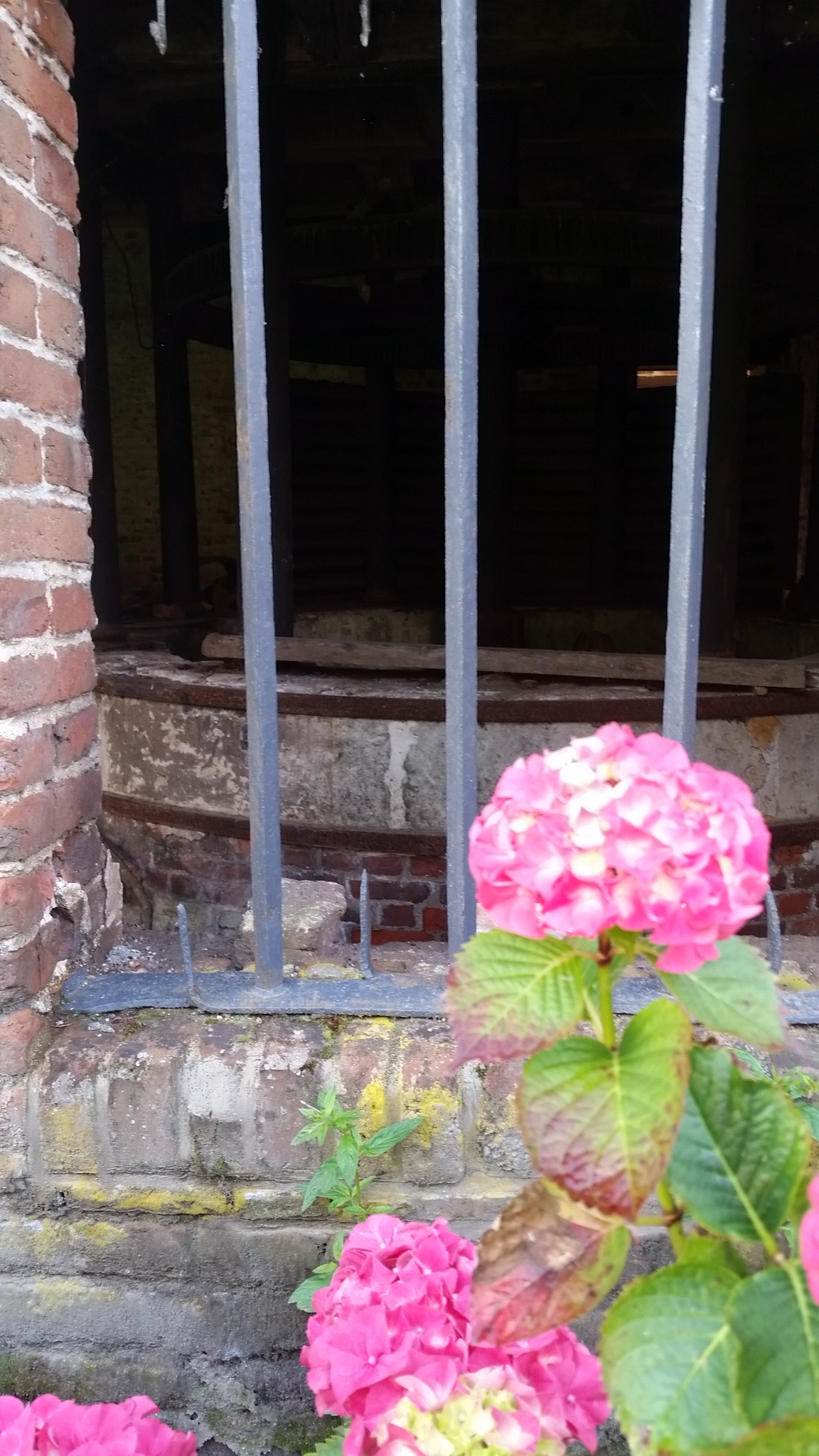 Moulin de Sénercy, vue intérieure